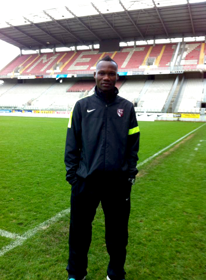 Désiré Sègbè Azankpo est né le 6 Mai 1993 au Bénin. Du haut de ses 21 ans, il est international béninois depuis le 17 Mai 2014. Ses prouesses techniques, ses conduites de balle, sa puissant athlétique, sa lourde frappe, sa pointe de vitesse phénoménale et ses passements de jambes hors pairs ont poussés le sélectionneur des Ecureuils du Bénin a lui confié la pointe de l’attaque de l’équipe nationale du Bénin.